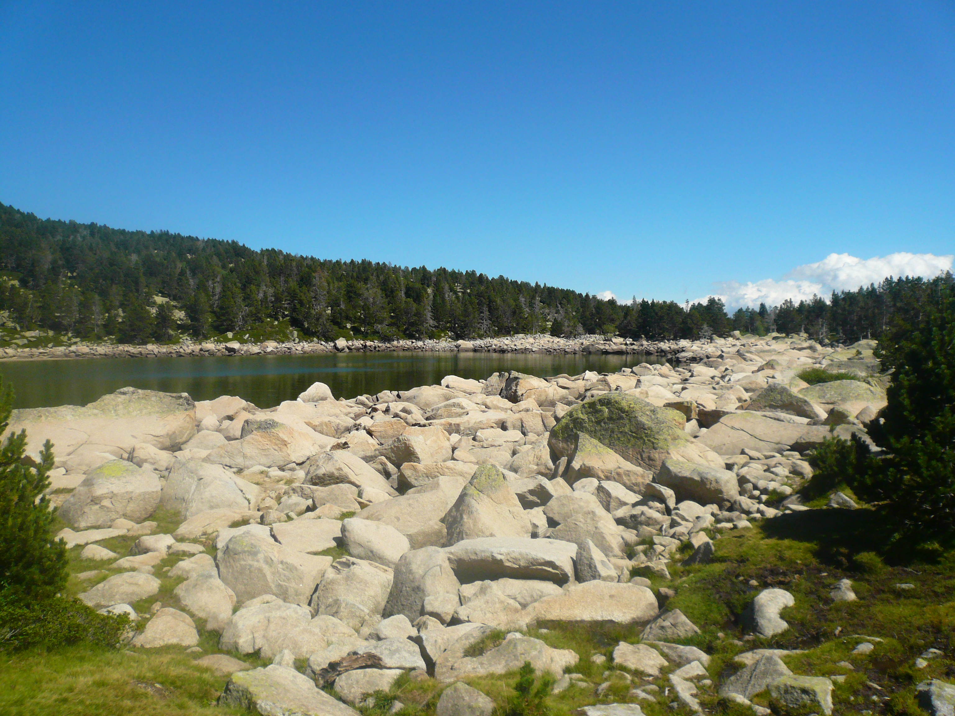 Tossa Plana de Lles-Puigpedrós (Cerdanya, Alt Urgell) (Lles de Cerdanya, les Valls de Valira, Meranges i altres). Fotos preses en una excursió del refugi de Malniu als estanys de Malniu i Mal. This is a a photo of a natural area in Catalonia, Spain, with id: ES510205 Object location42° 27′ 00″ N, 1° 42′ 00″ E